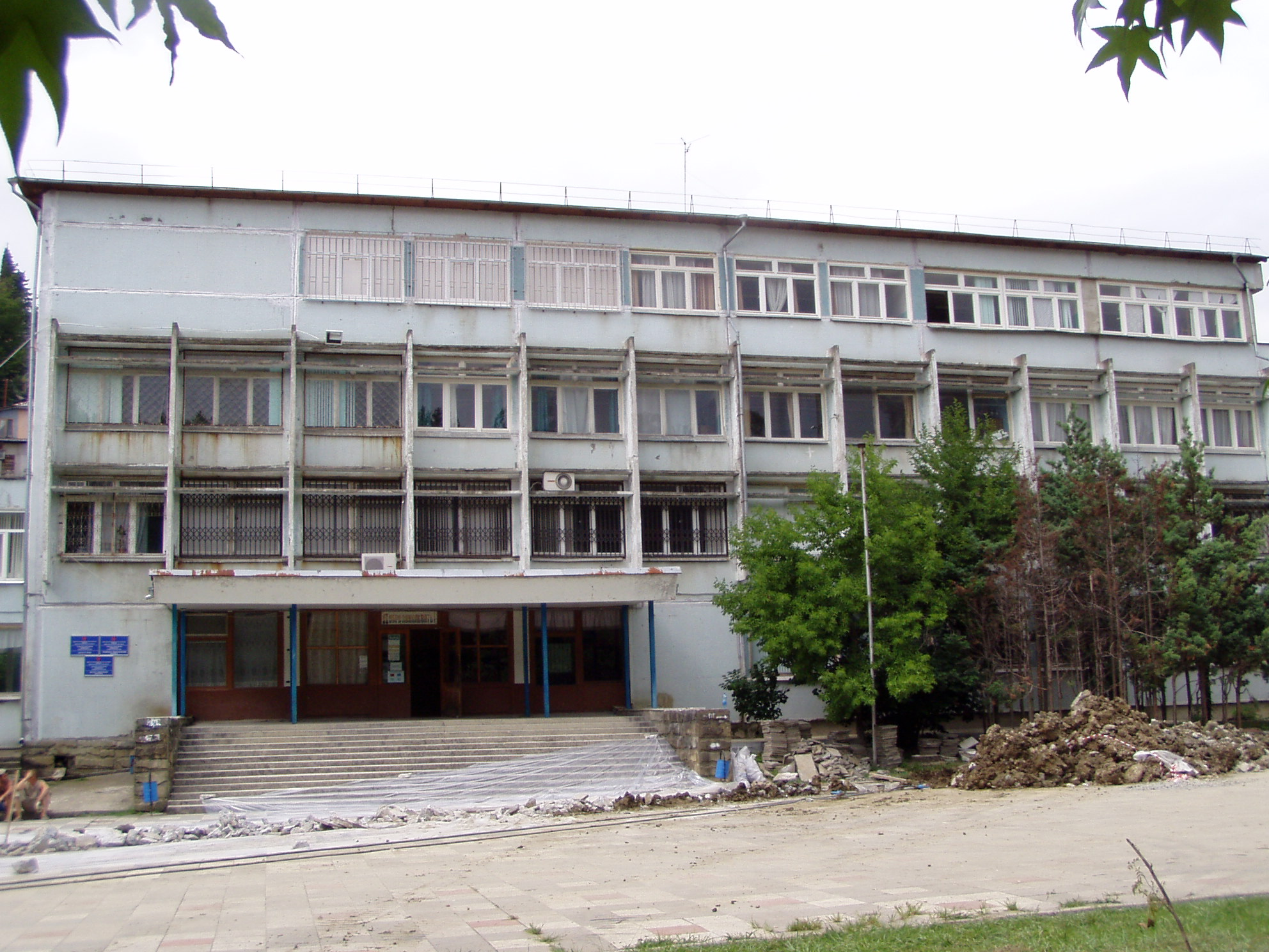 Лицензия